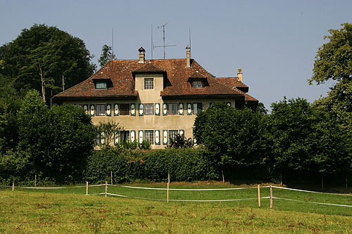 Schloss Kastelen in Alberswil